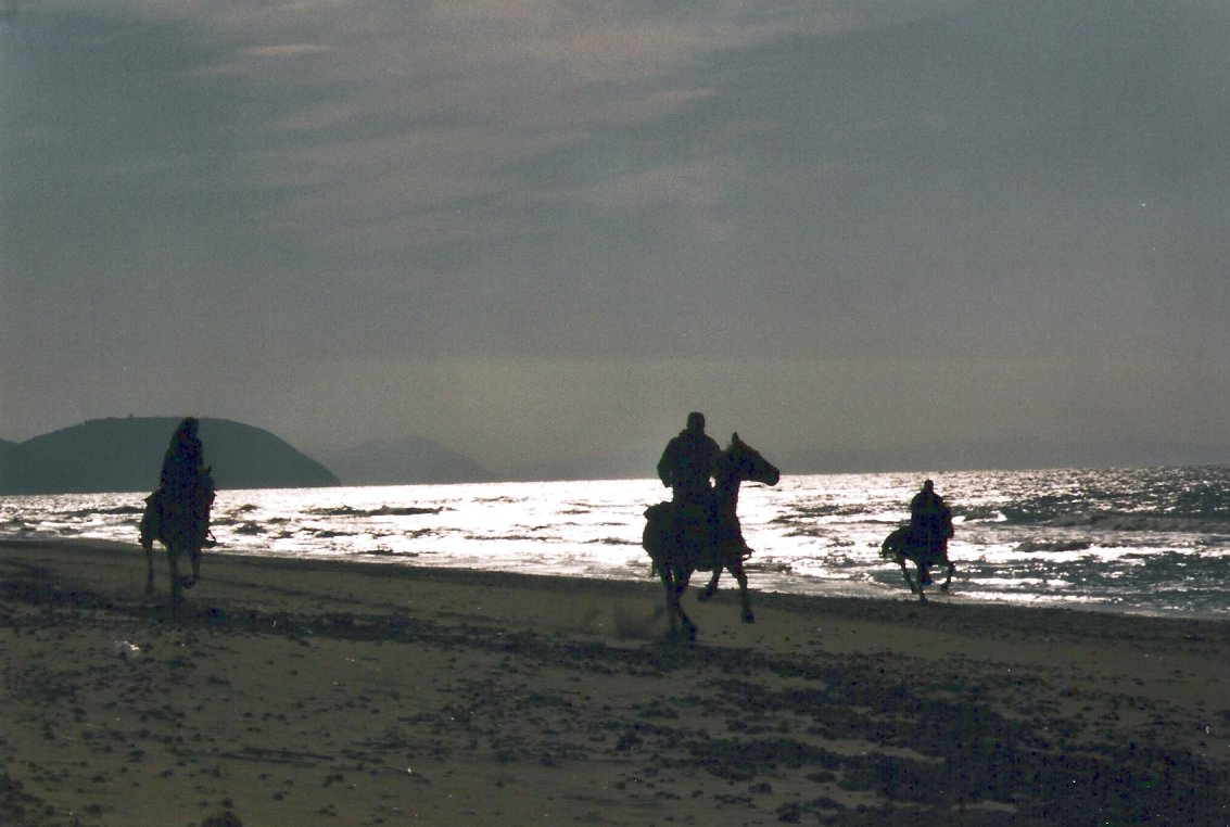 Fotografia del Parco